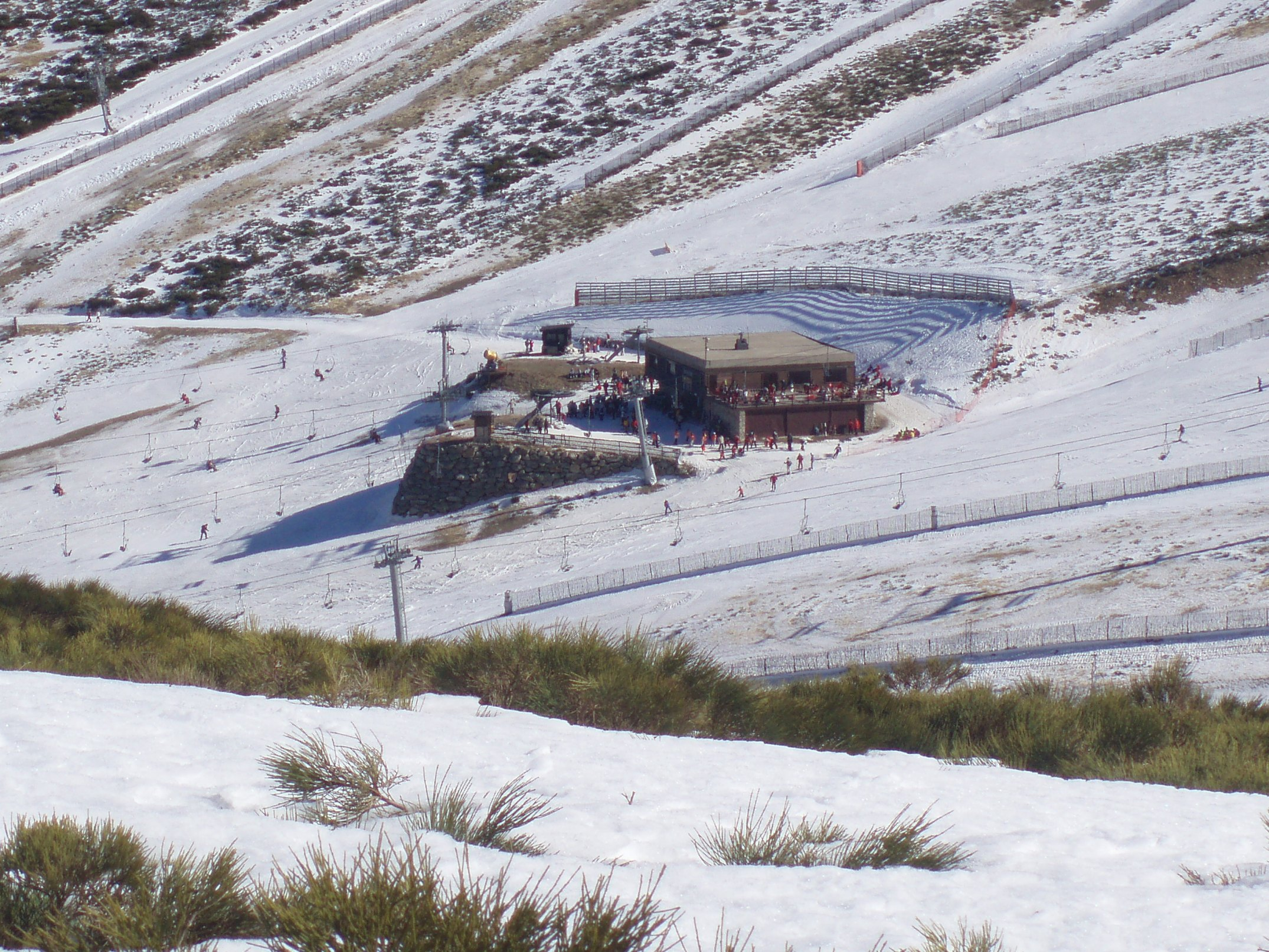 Cafetería situada en el centro de Valdesquí (Sierra de Guadarrama, España).